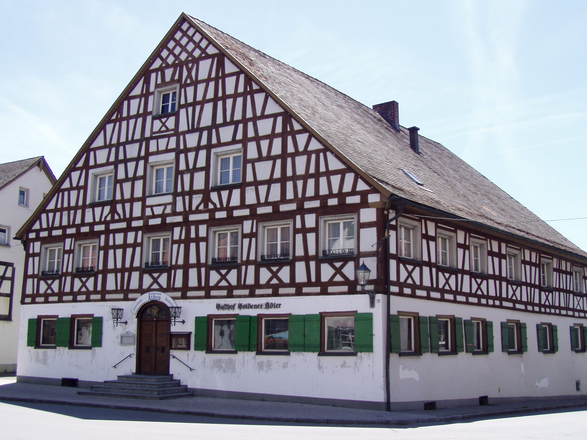 Gasthof Goldener Adler in Kißlegg